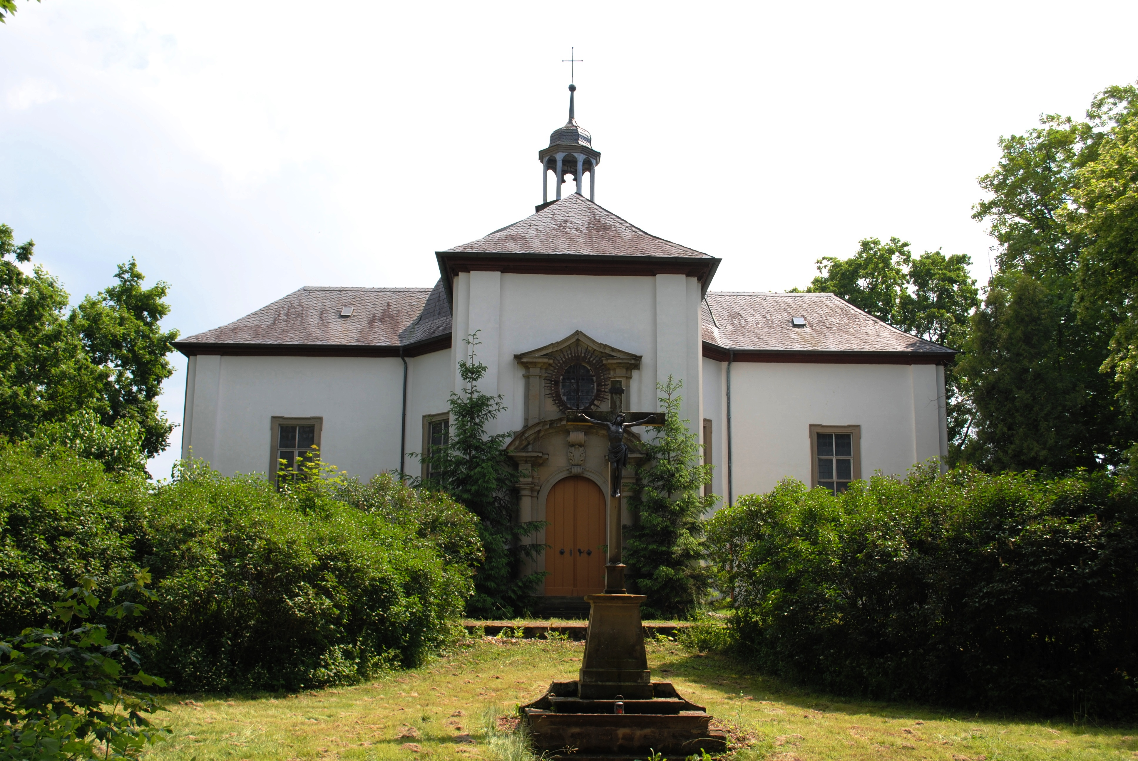 Kreuzkapelle, Wiesentheid, D-6-75-178-46